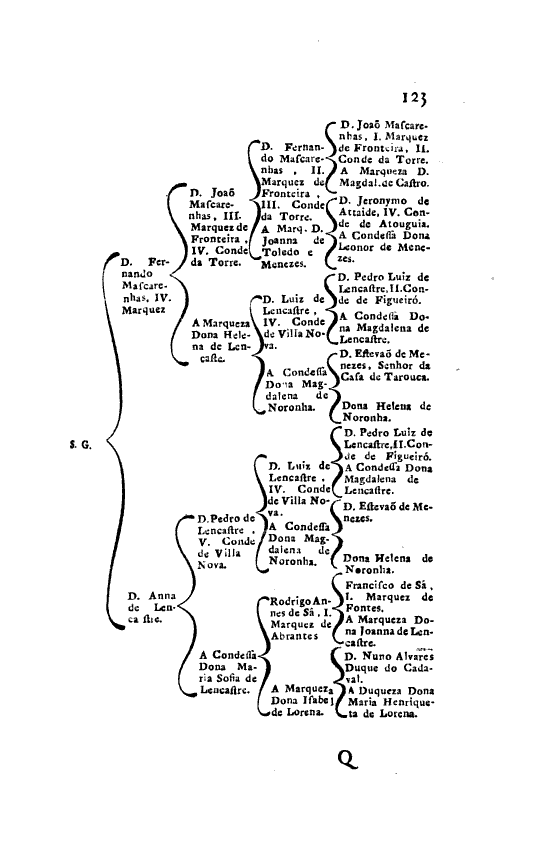 Página 123 das "Memorias Historicas e Genealogicas dos Grandes de Portugal", 3.a edição ― Costados dos Marqueses de Fronteira